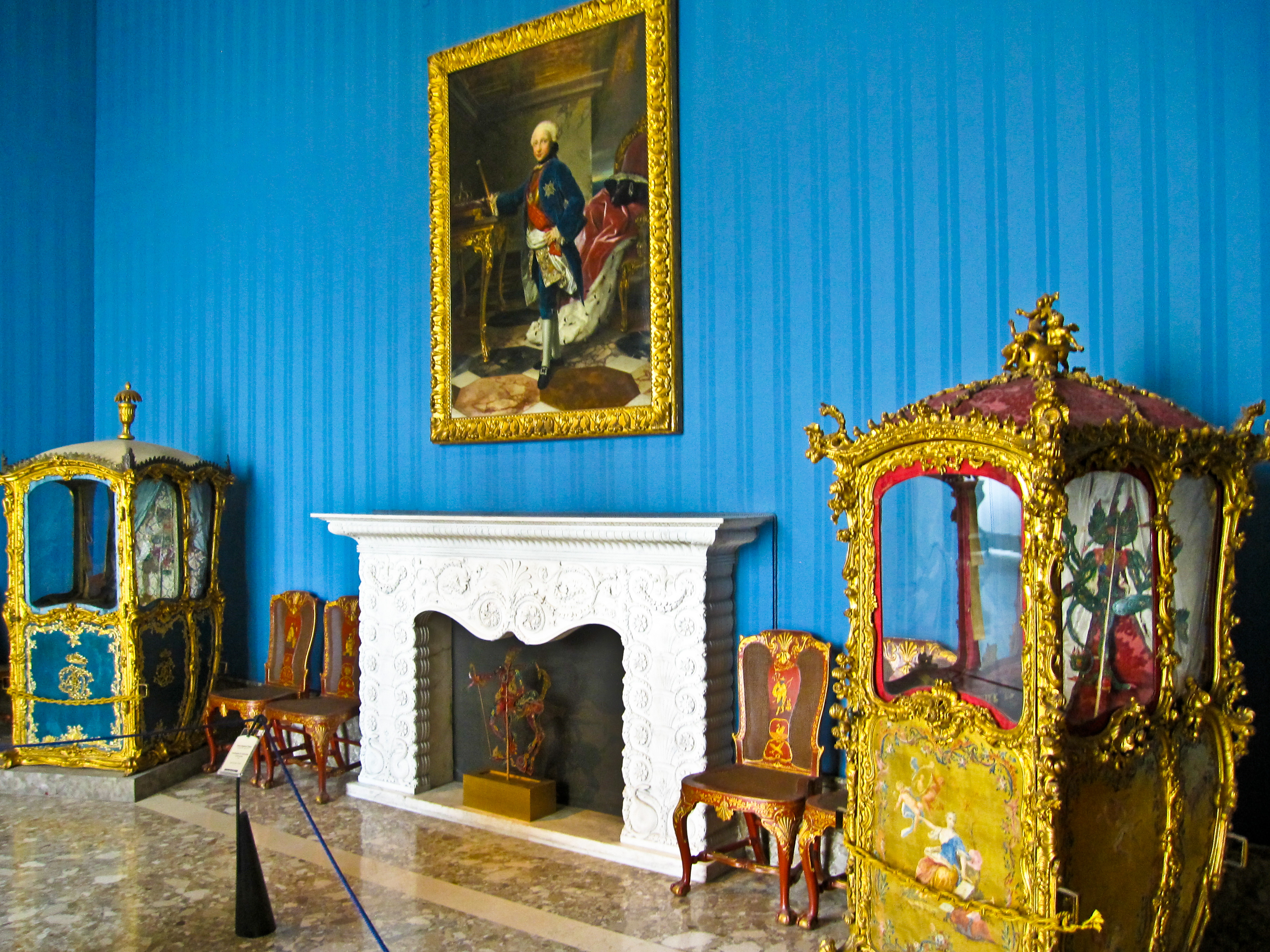 Una sala del museo di Capodimonte (Napoli)